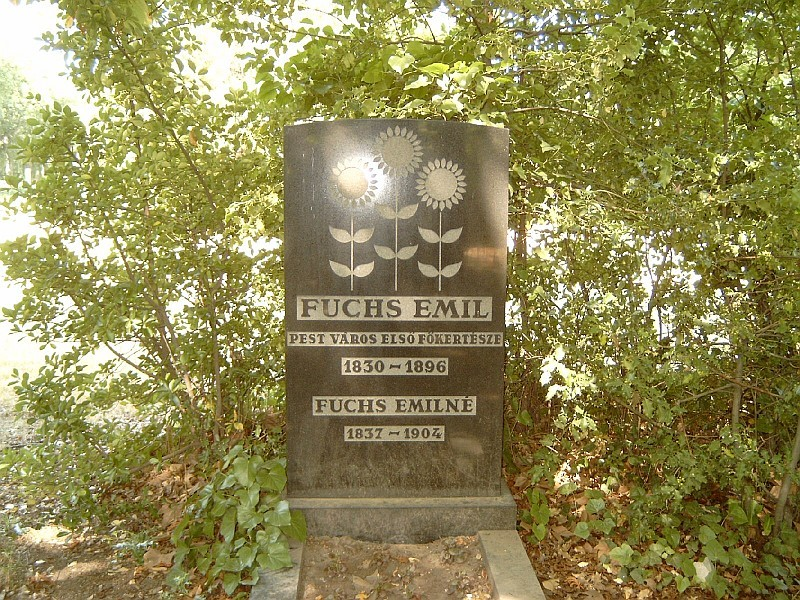 Fuchs Emil (Várpalota, 1830. március 25. – Budapest, 1896. augusztus 24–27. között) kertész sírja Budapesten. Kerepesi temető: 10-1-59